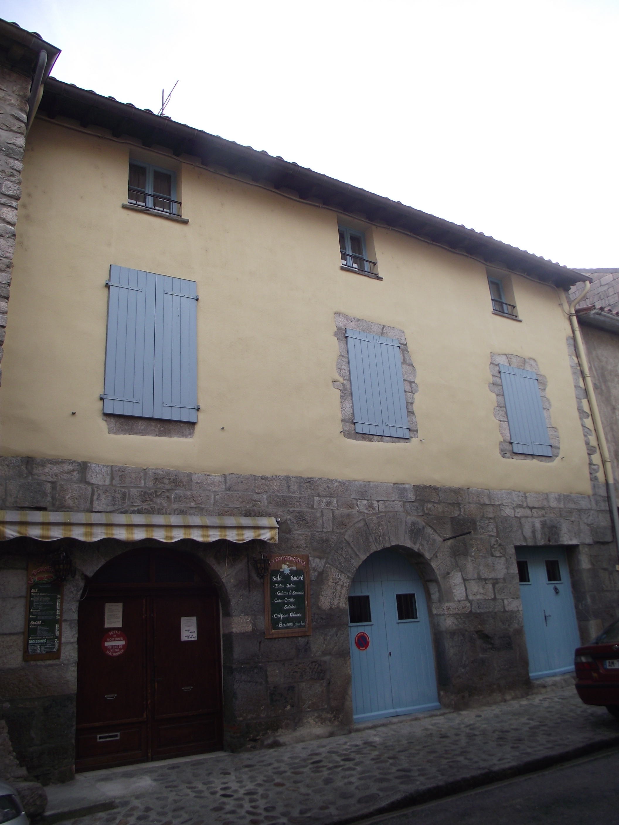 Casa Deixonne (Vilafranca de Conflent)